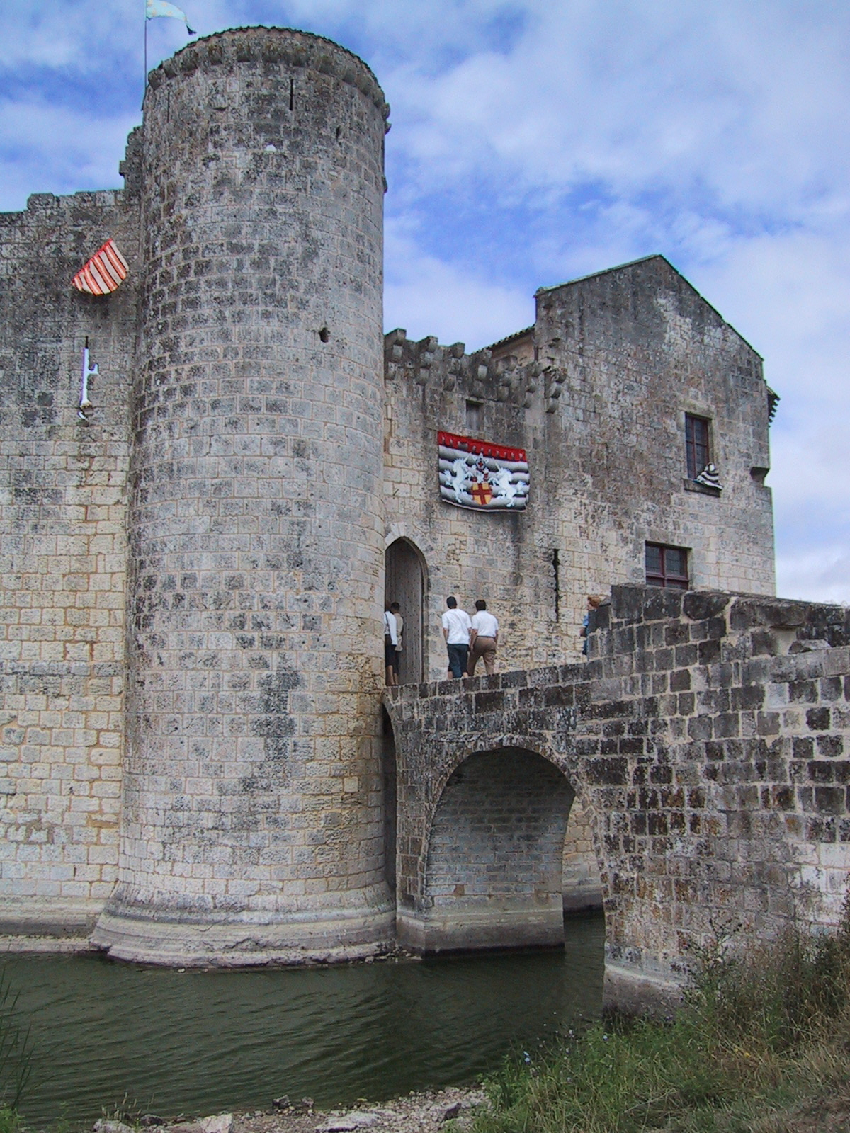 Château de Saint-Jean-d'Angle. Château fort médiéval. XIIe à XVIIe siècles. Charente-Maritime (17), Région Poitou-Charentes, France.